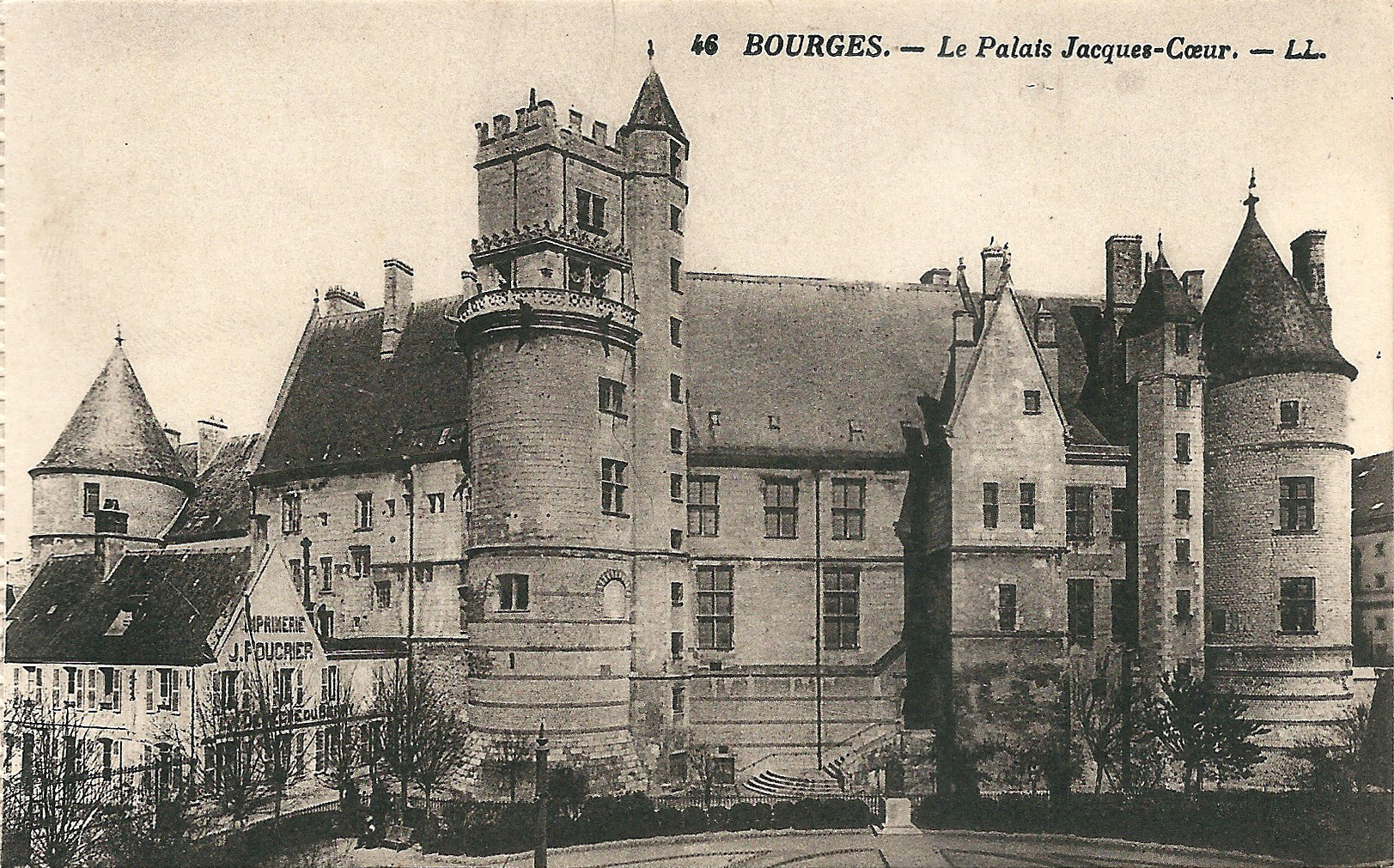 Carte postale ancienne de Bourges (Cher, France)